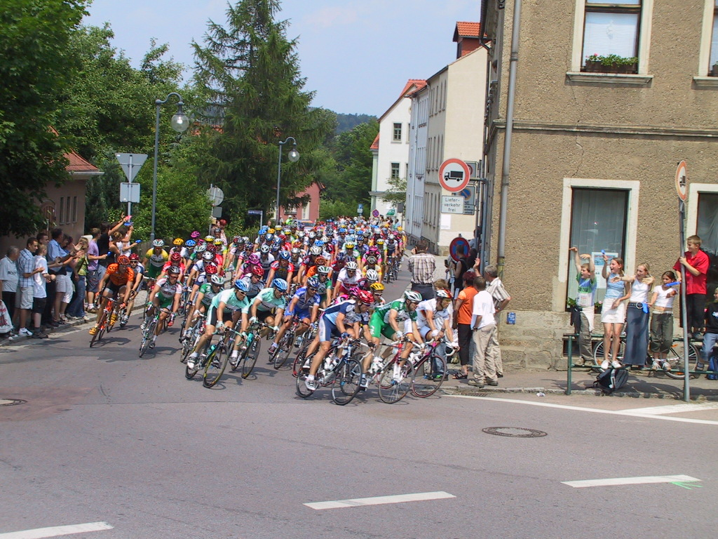 Fahrerfeld der Deutschlandtour 2003 in Dippoldiswalde